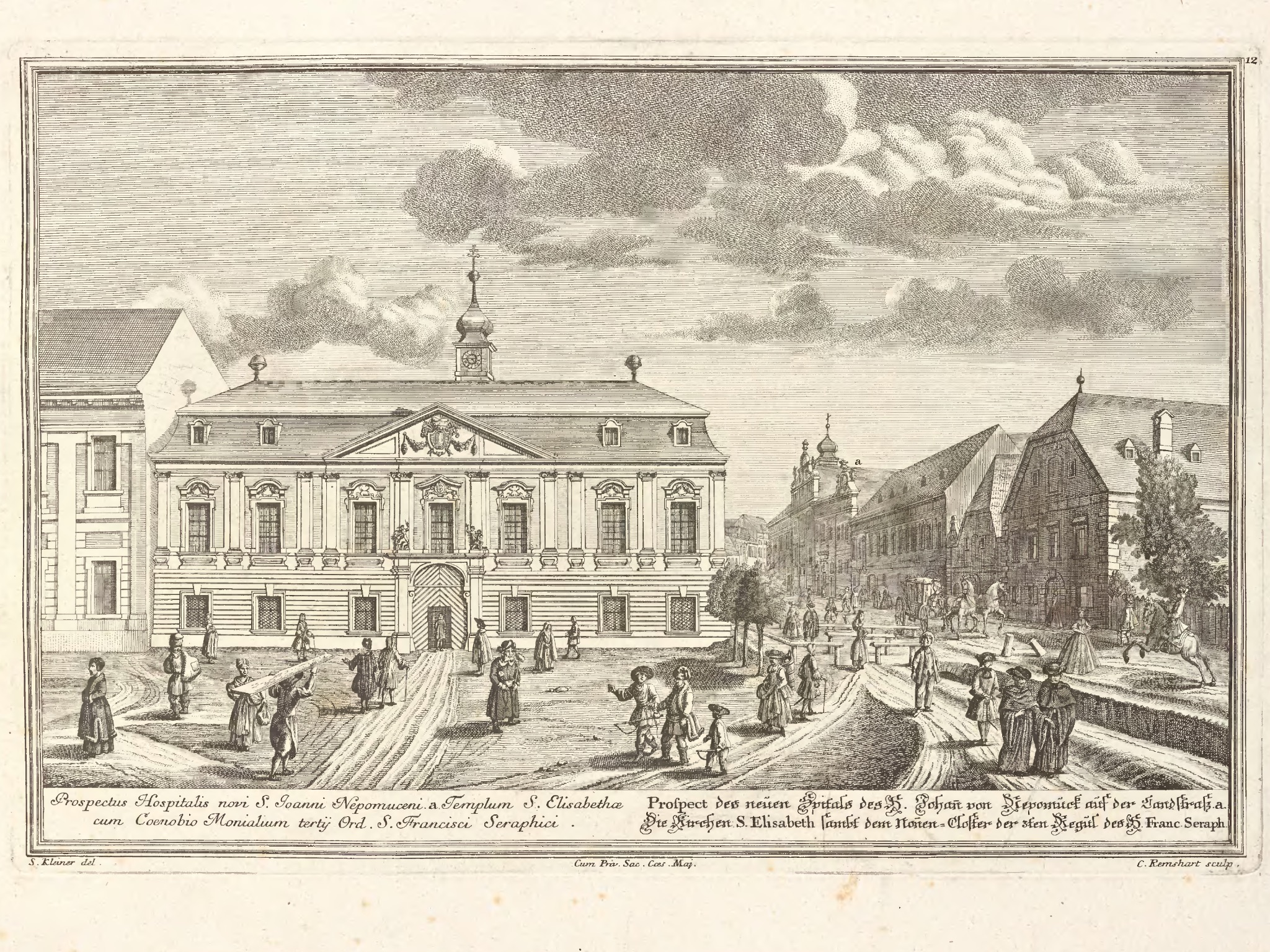 Prospect des neuen Spitals des H. Johann von Nepomuck auf der Landstraß. Kupferstich aus Kleiner: Das florirende vermehrte Wien.... Augsburg, J. A. Pfeffel, 1733. Links das als Nepomucenispital bekannte Armenhaus, das später zum Invalidenhaus umgebaut wurde; rechts die Landstraßer Hauptstraße mit der Elisabethinenkirche.